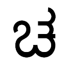 чакараву